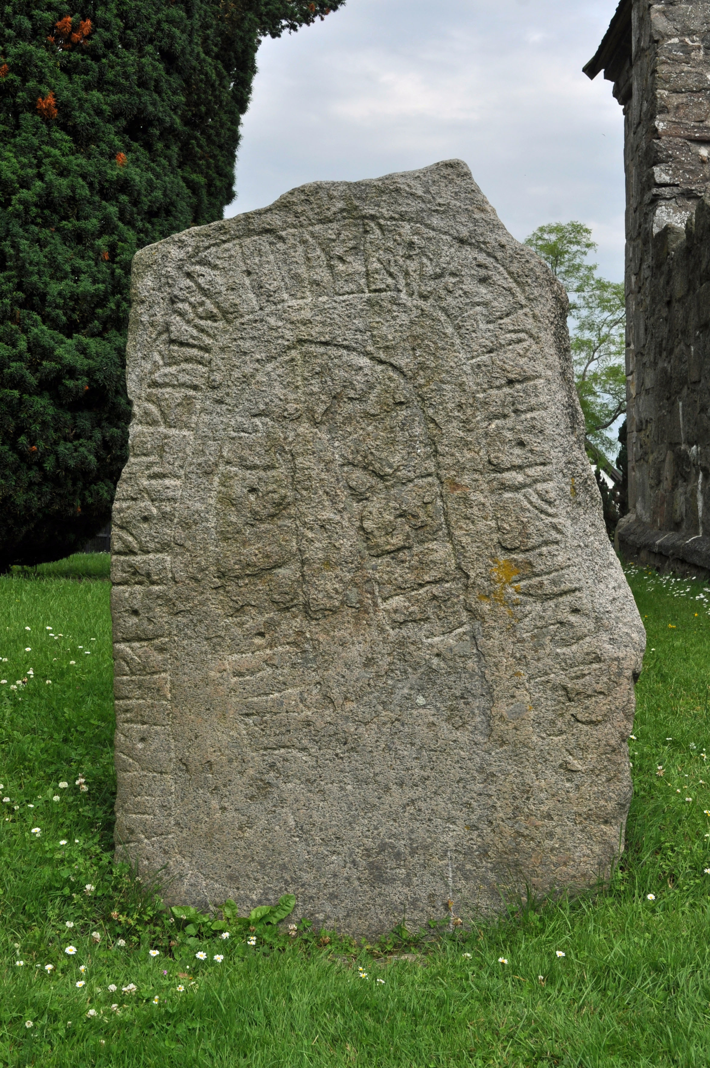 Østermarie Kirche, Bornholm (2012-07-11), by Klugschnacker in Wikipedia (12)